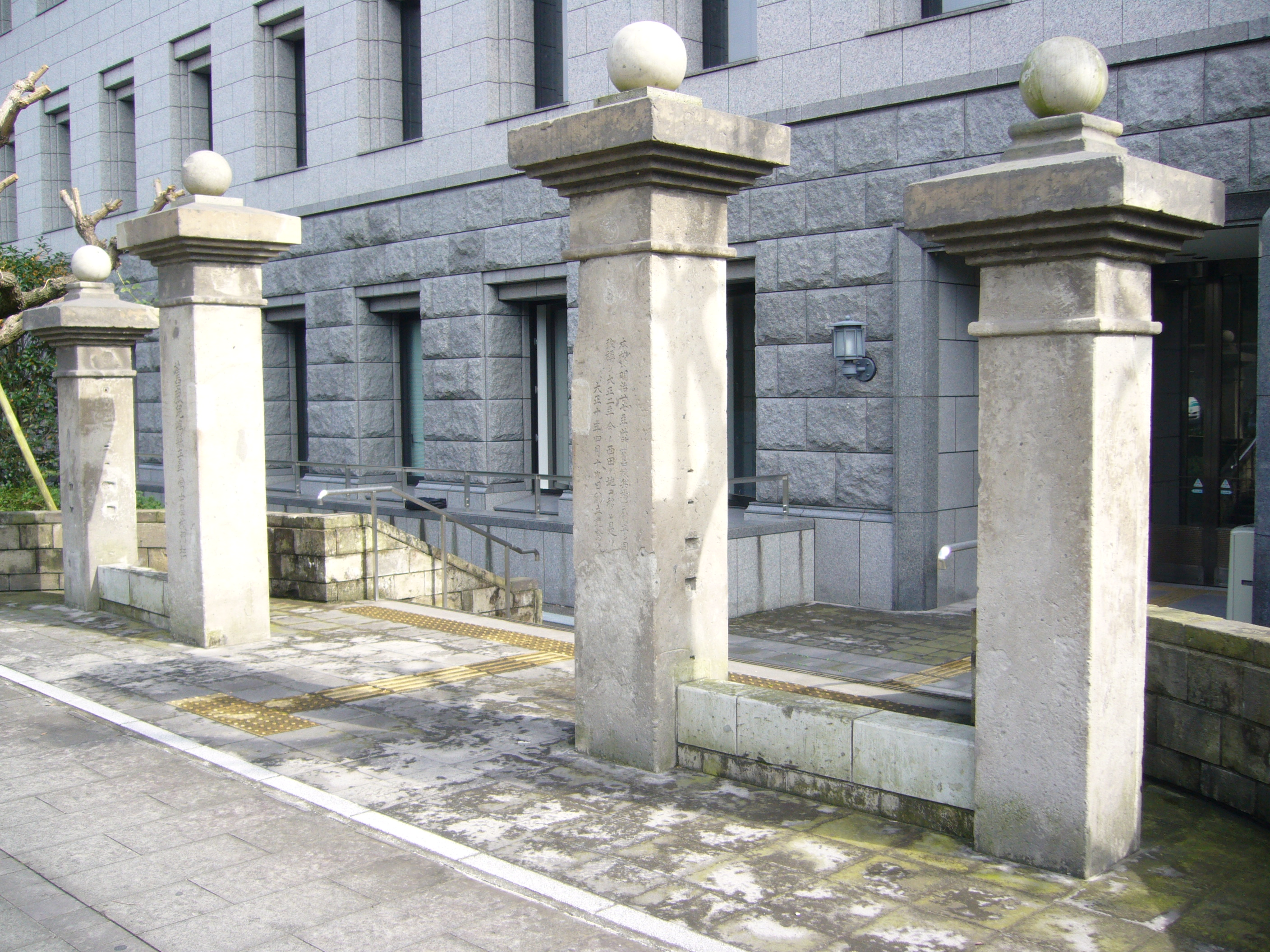 鹿児島県尋常中学校門柱